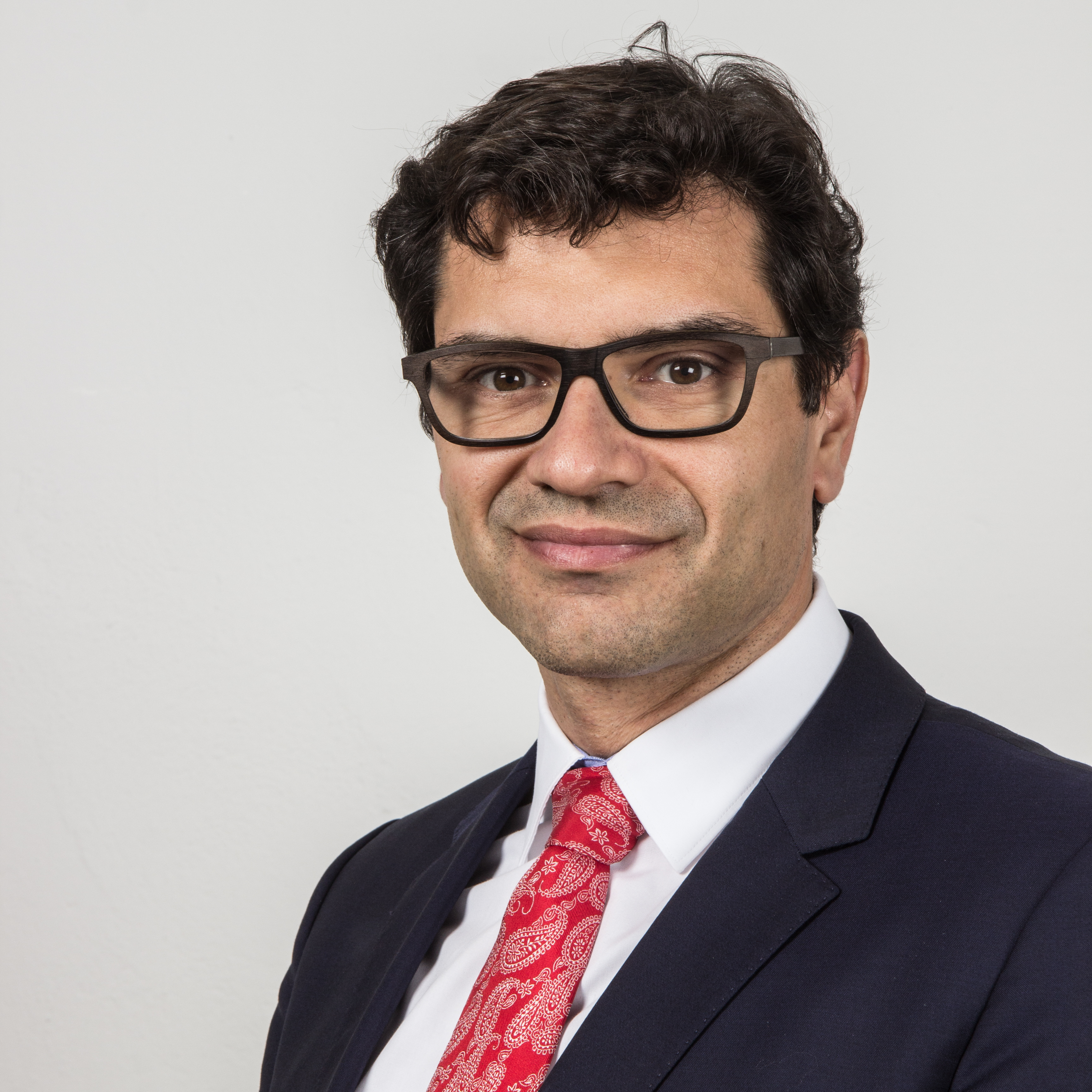 Der rheinland-pfälzische Politiker Salvatore Barbaro